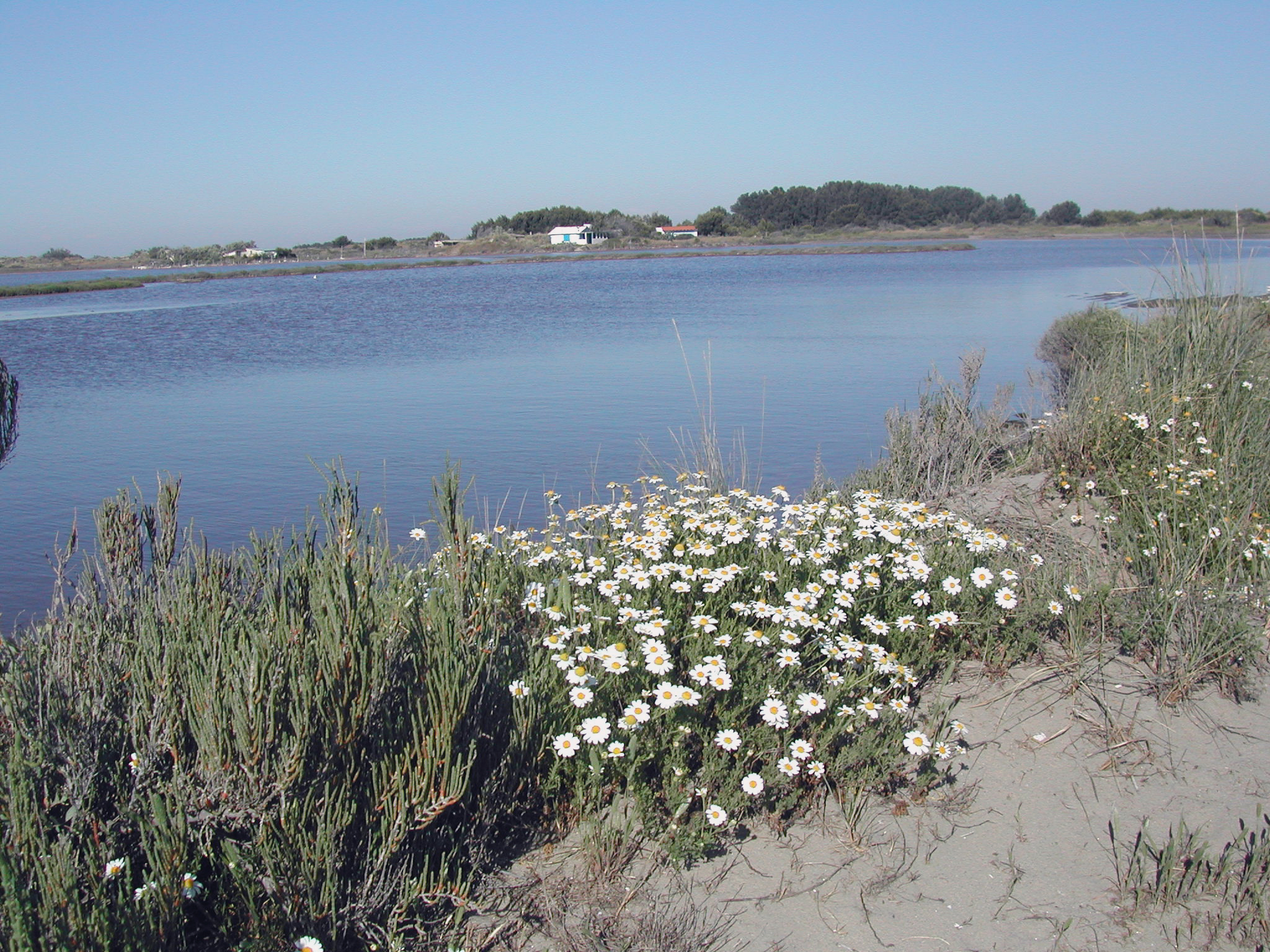 Anthemis maritima au bord de la lagune à Beauduc